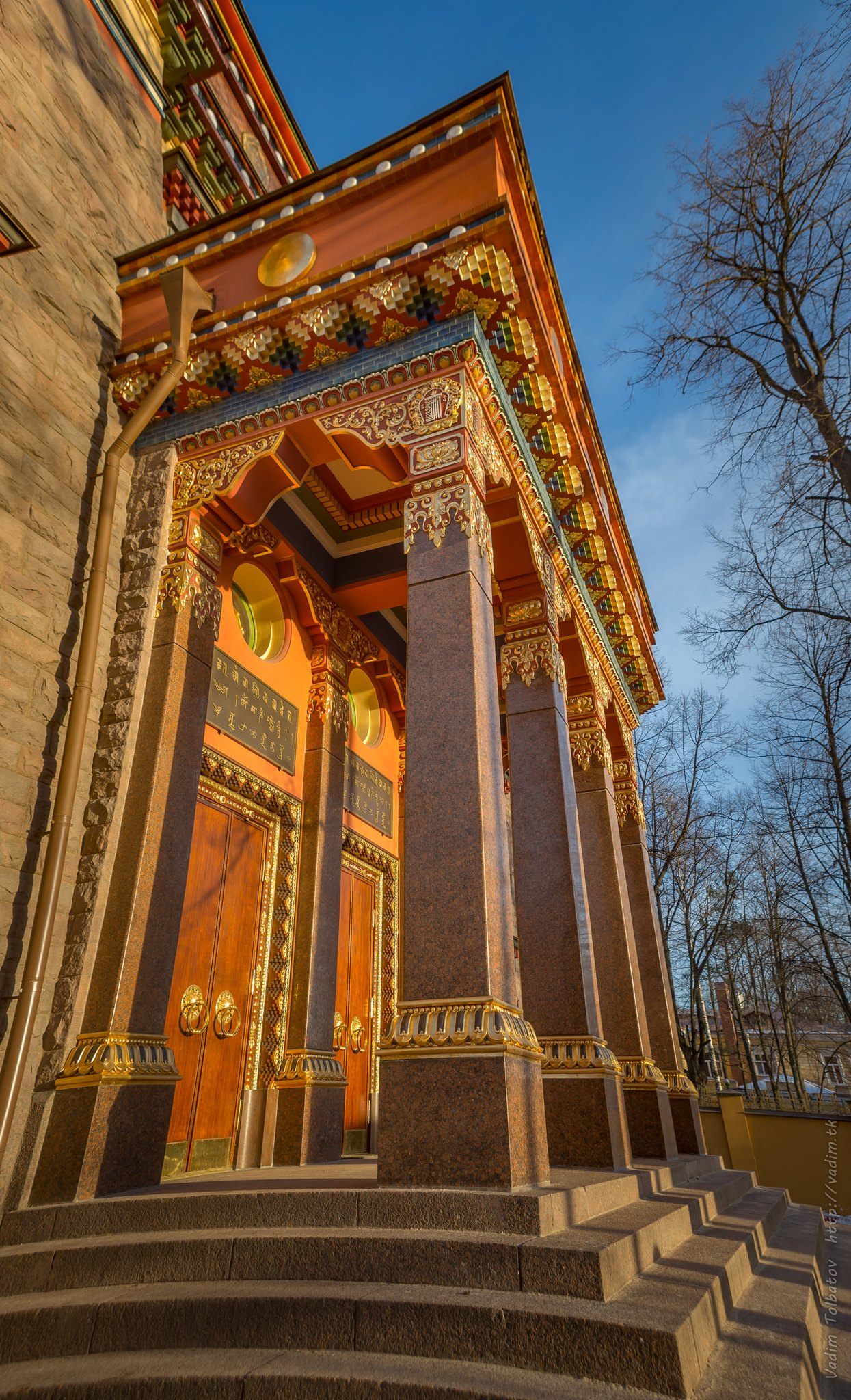 Вход в Дацан Гунзэчойнэй